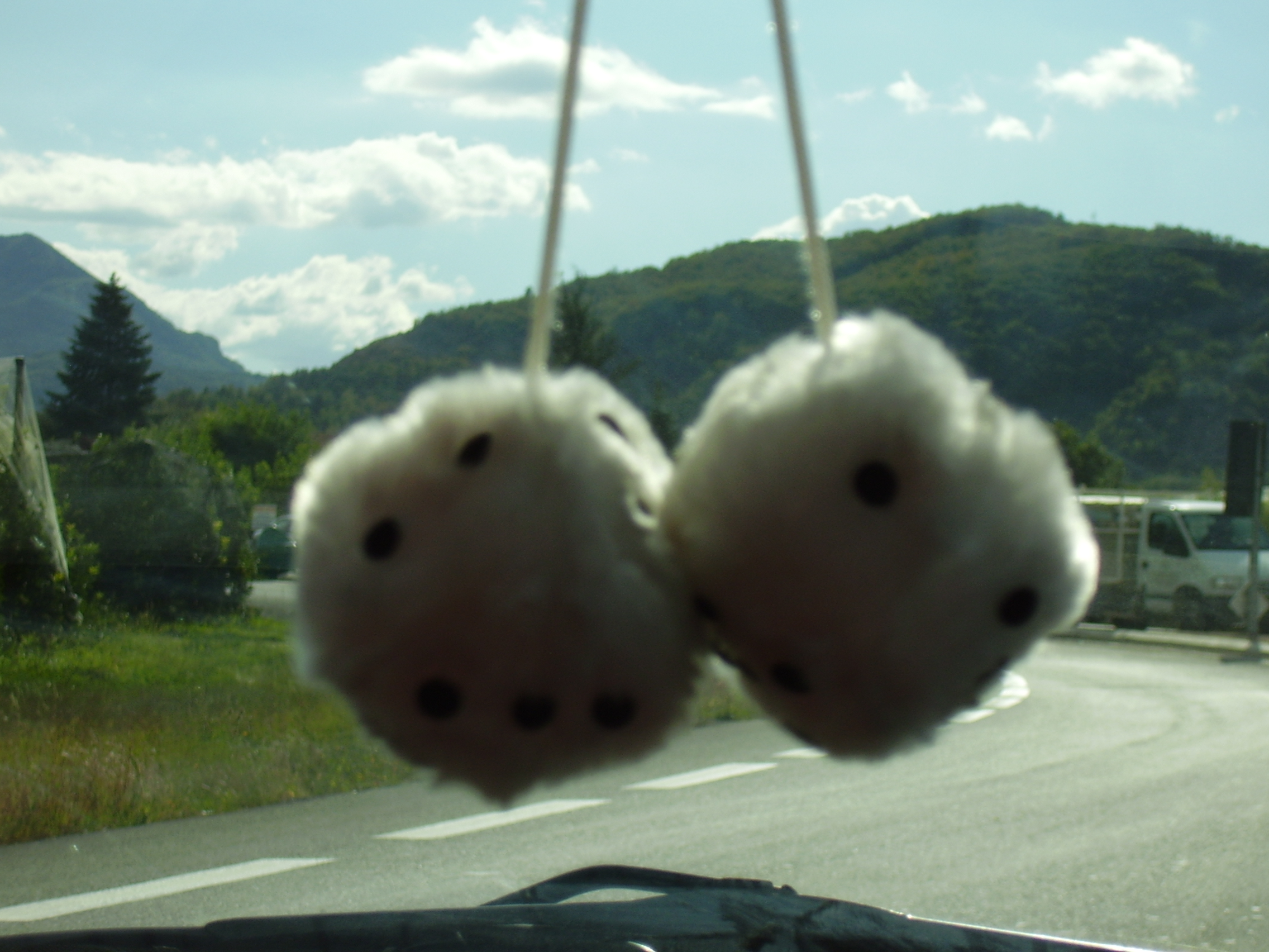 Fuzzy dice on a car window